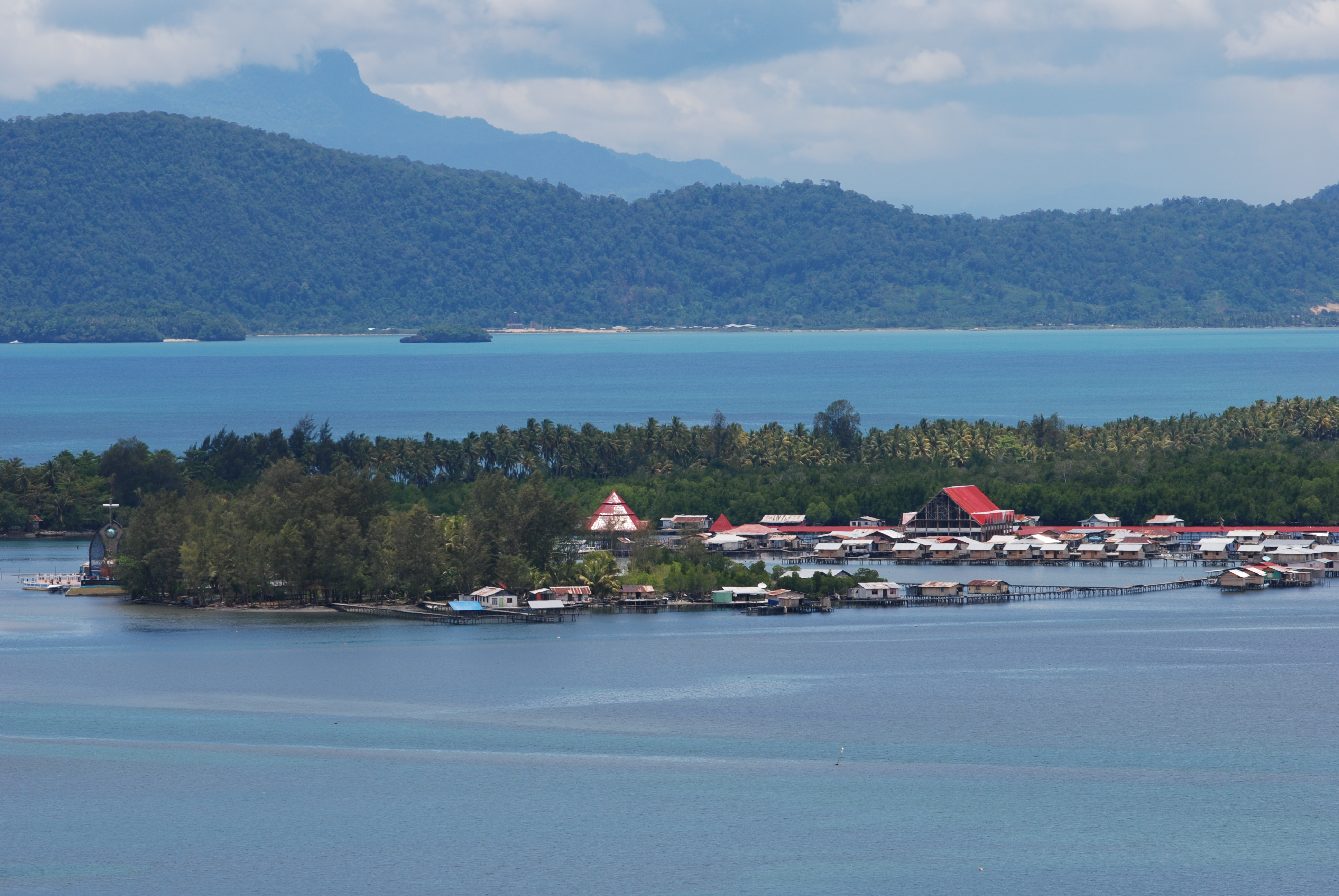 Kampung Tobati_Jayapura